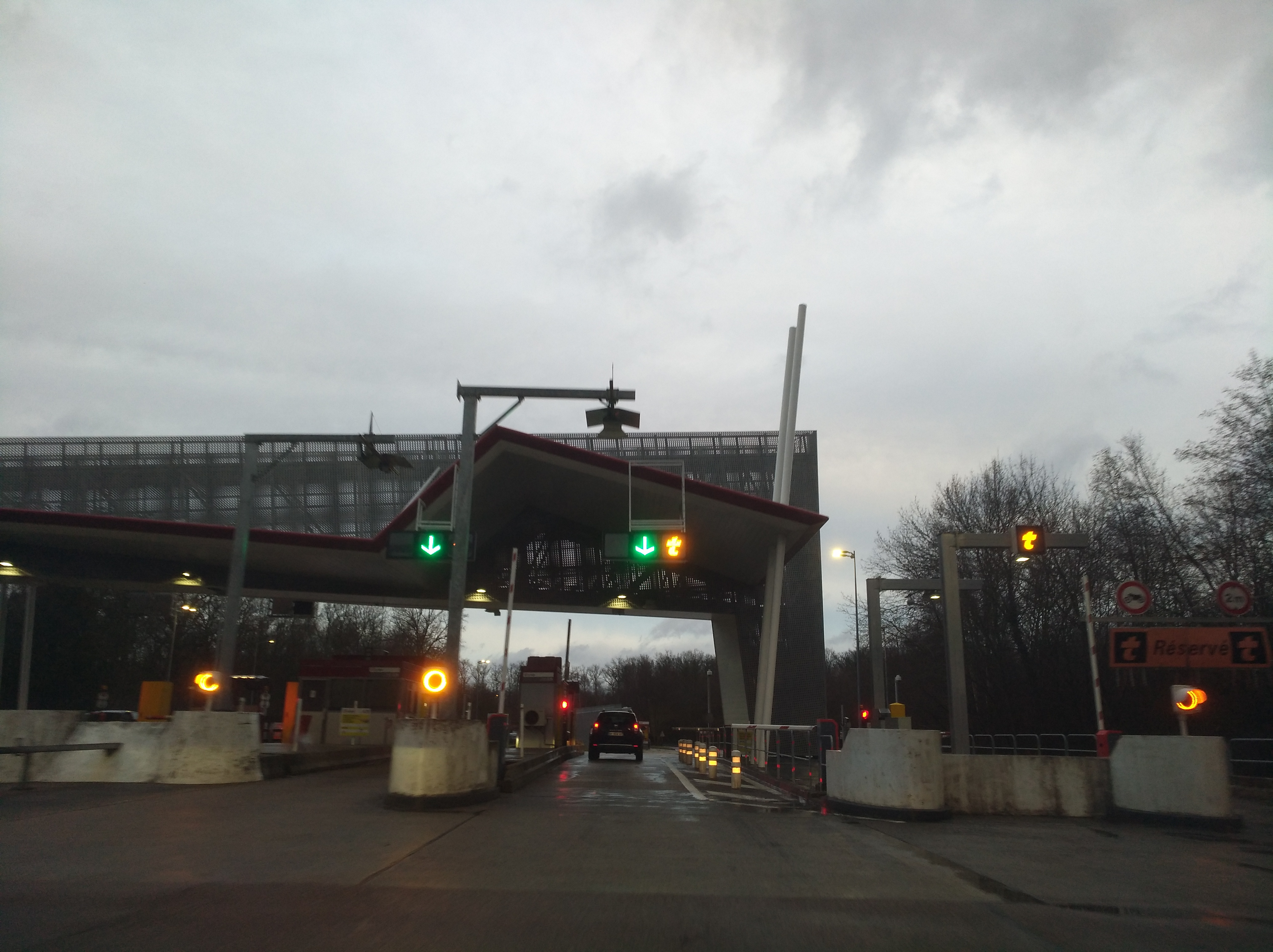 Arrivée au péage de Soirans (Côte-d'Or, France), sur l'autoroute A39, à la sortie 5.